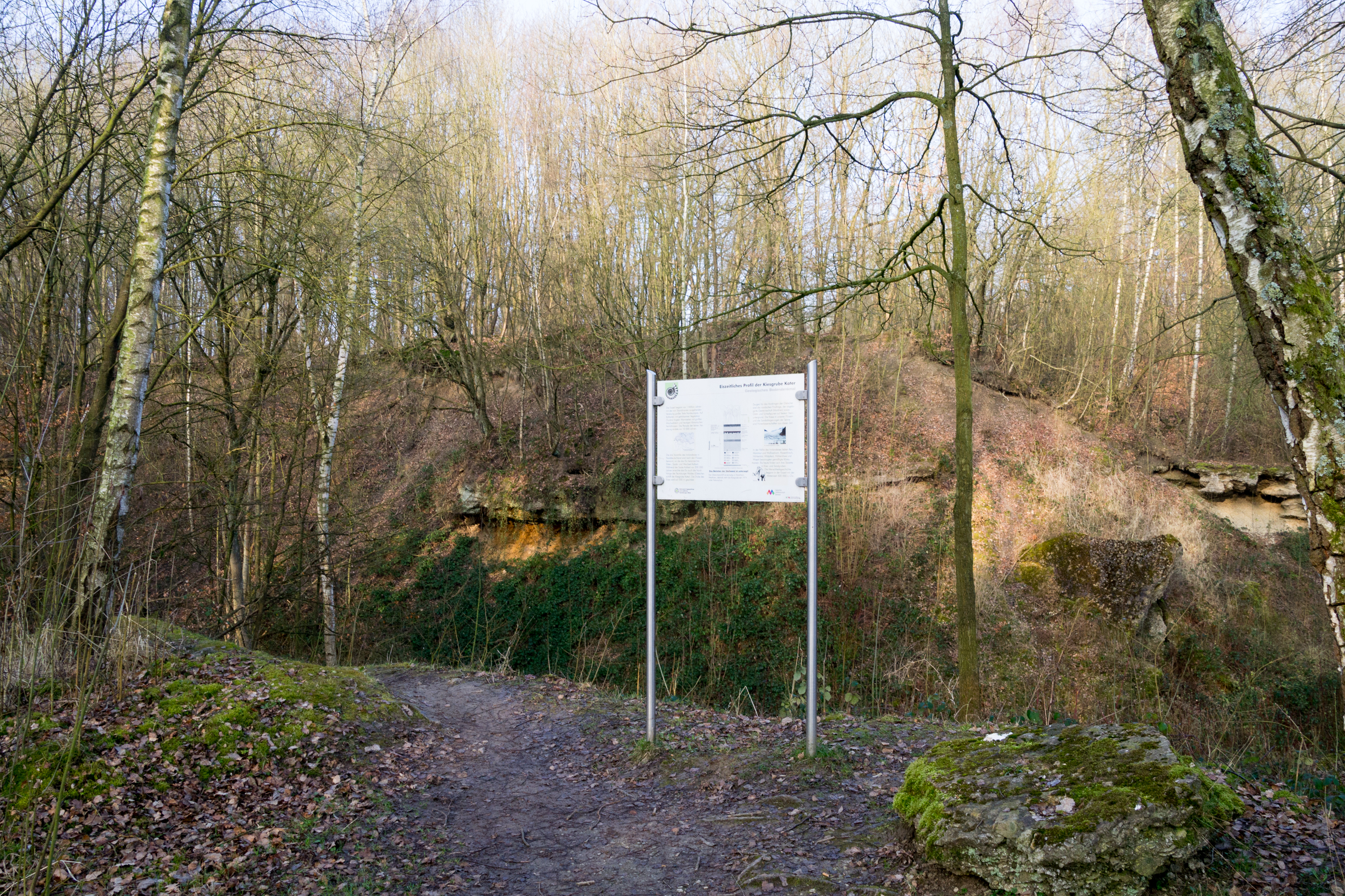 Geologisches Naturdenkmal Kiesgrube Kater mit Gletscherschliff in Detmold/Hiddesen